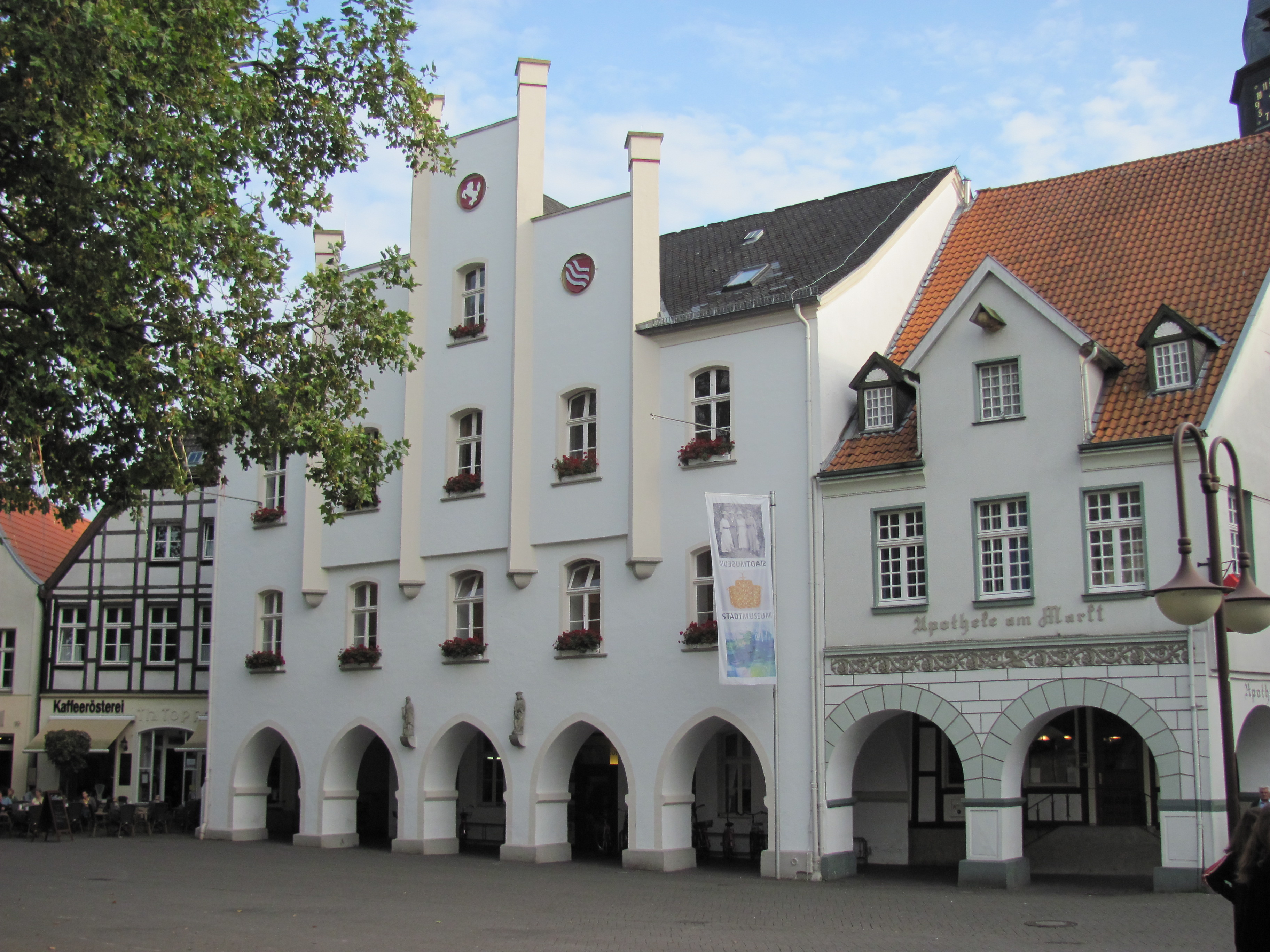 Alte Rathaus Beckum, heutiges Stadtmuseuem